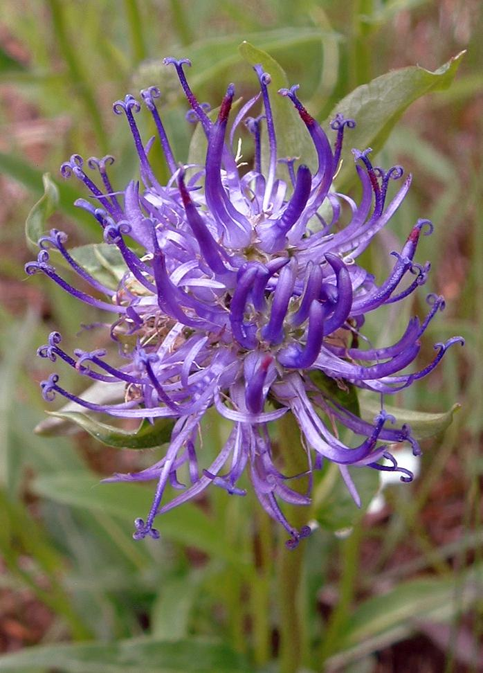 Phyteuma orbiculare, Raiponce orbiculaire, Auberive.